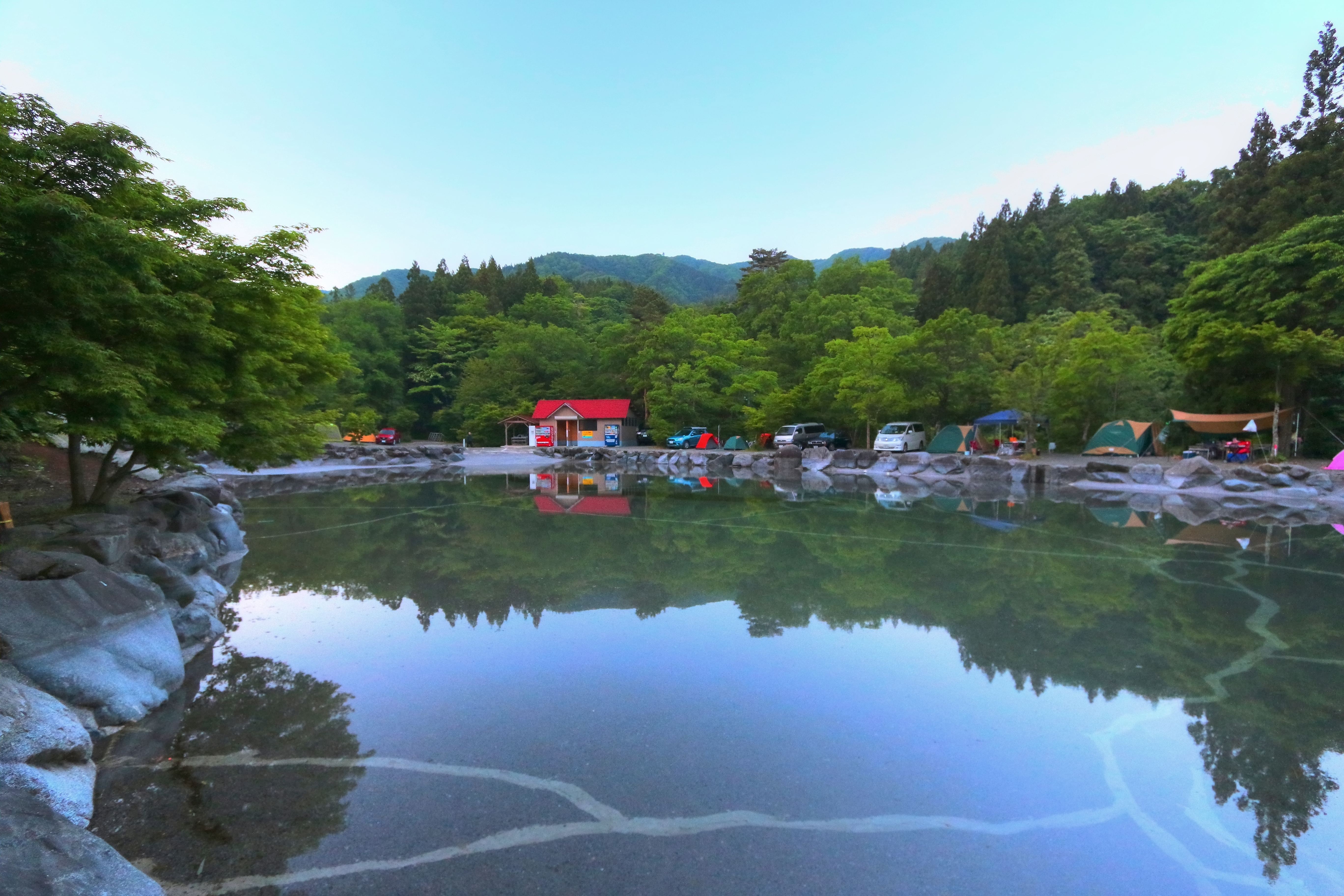 道志の森キャンプ場